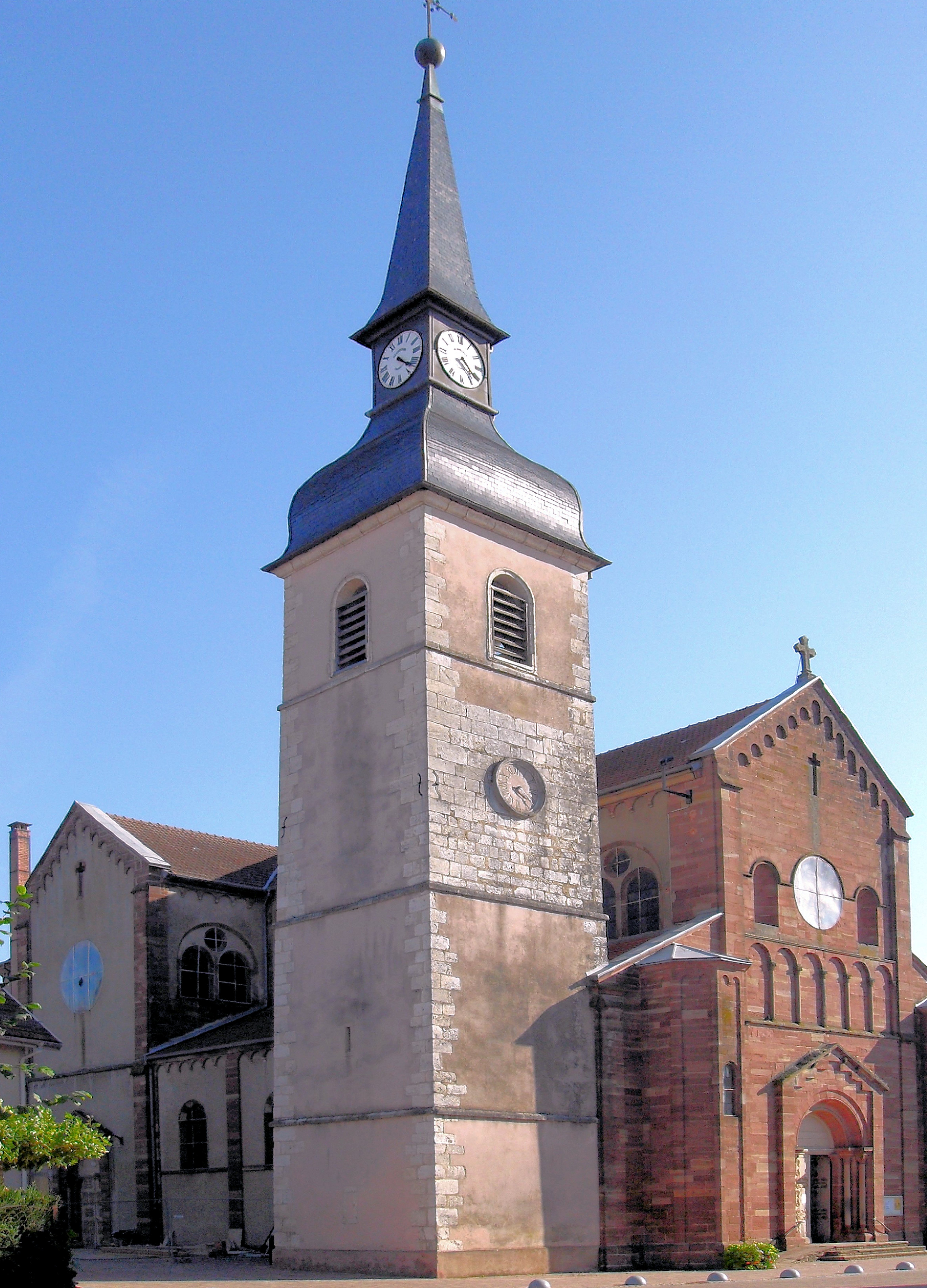 L'église Saint-Martin à Grandvillars